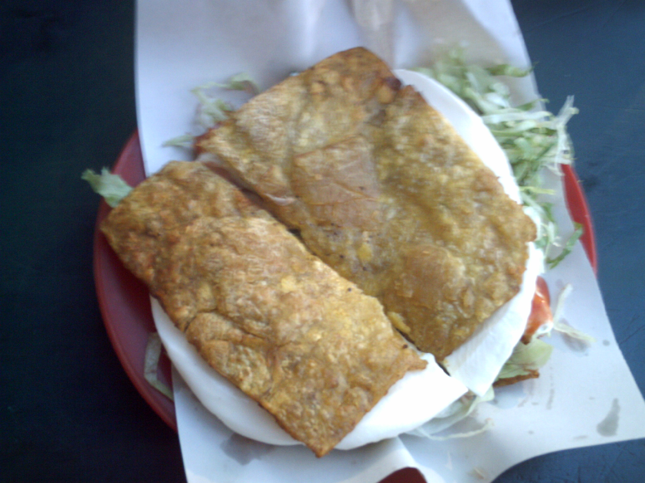 Comida a base de platanos, queso y vegetales